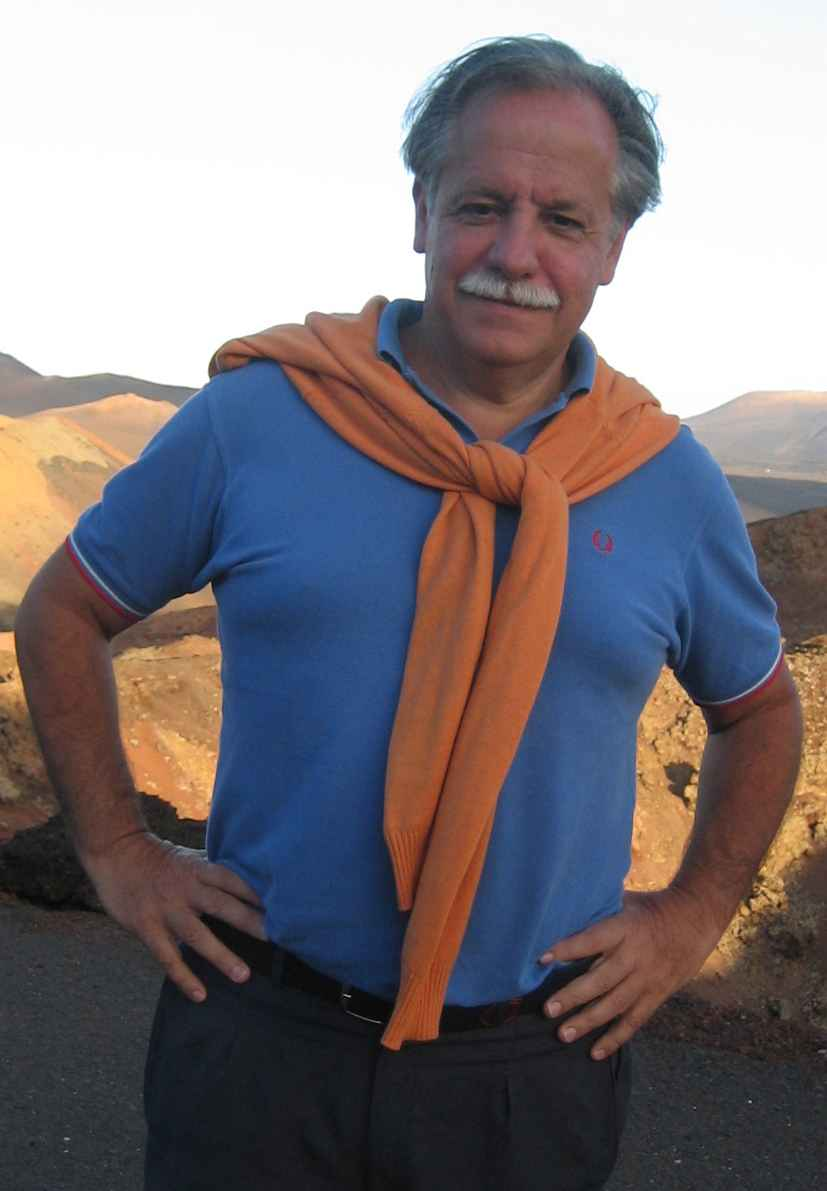 El Periodista Rafael Fraguas